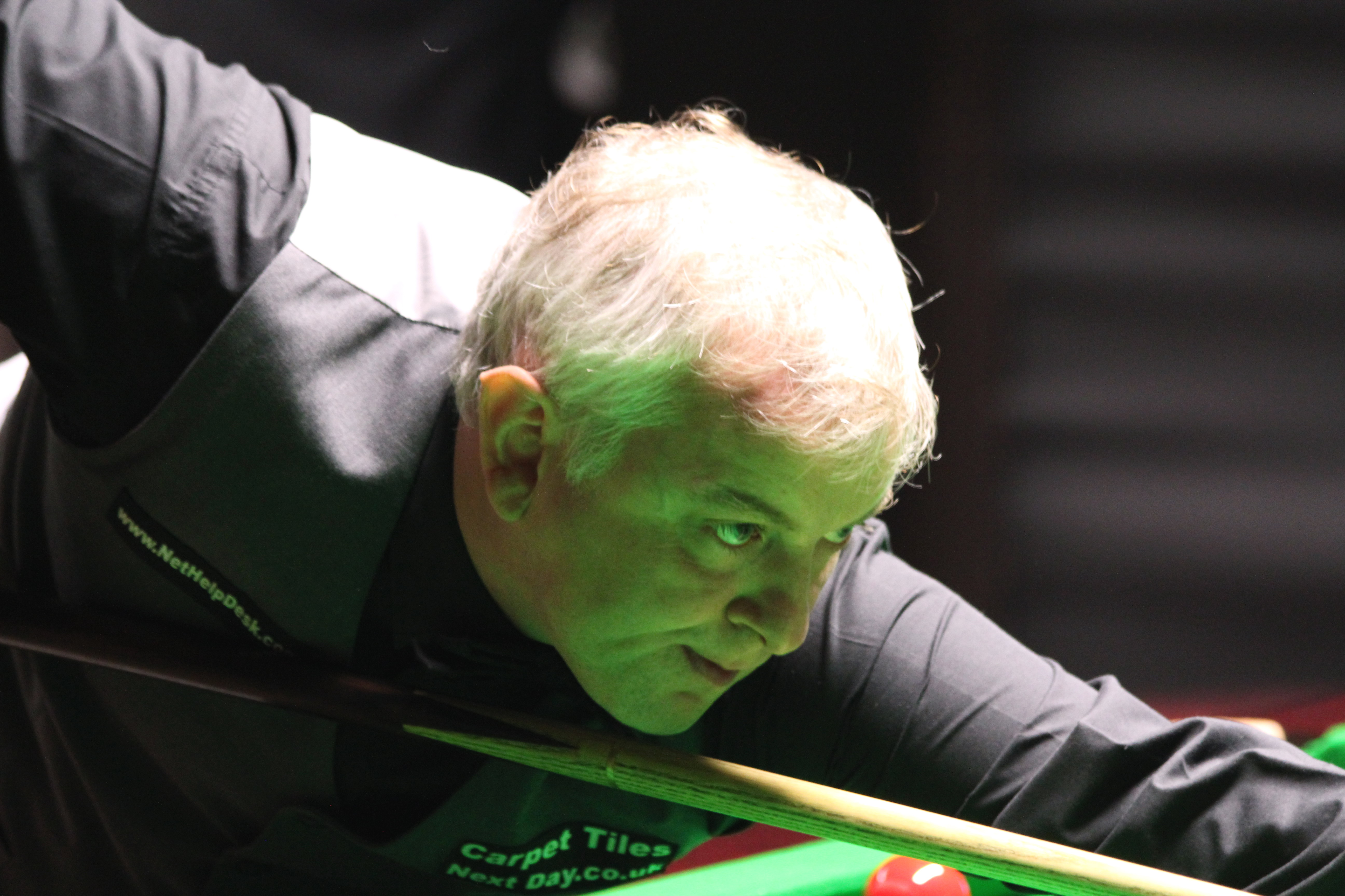 Barry Pinches beim Paul Hunter Classic 2016